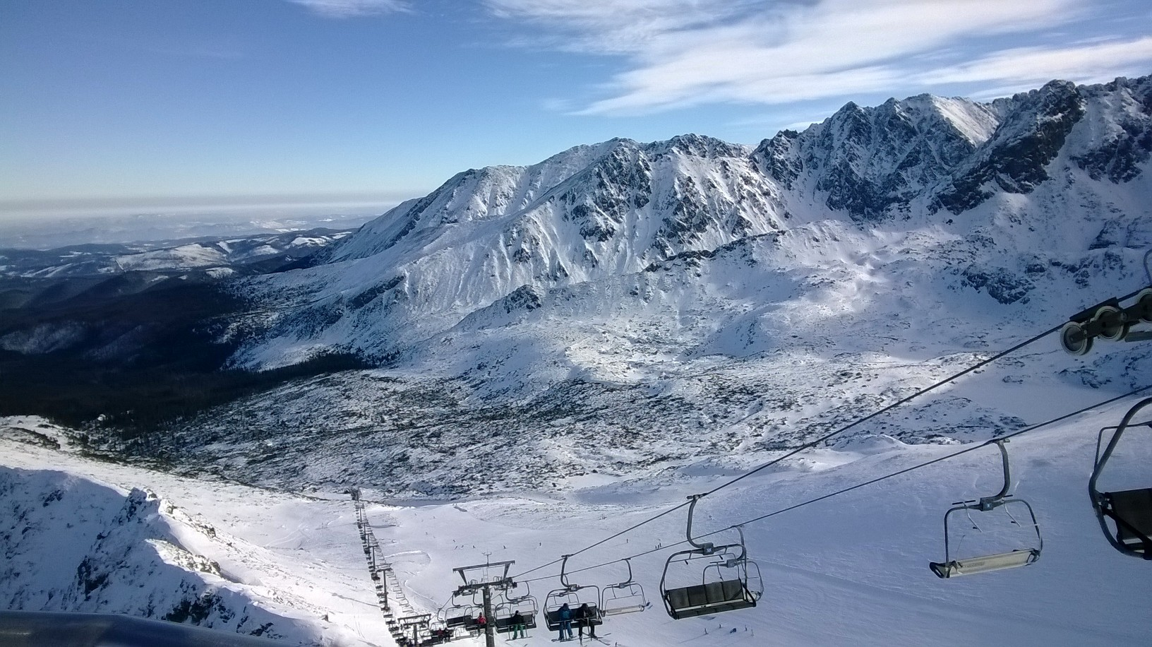 Kasprowy Wierch This is a photography of protected area with CRFOP ID PL.ZIPOP.1393.PN.14